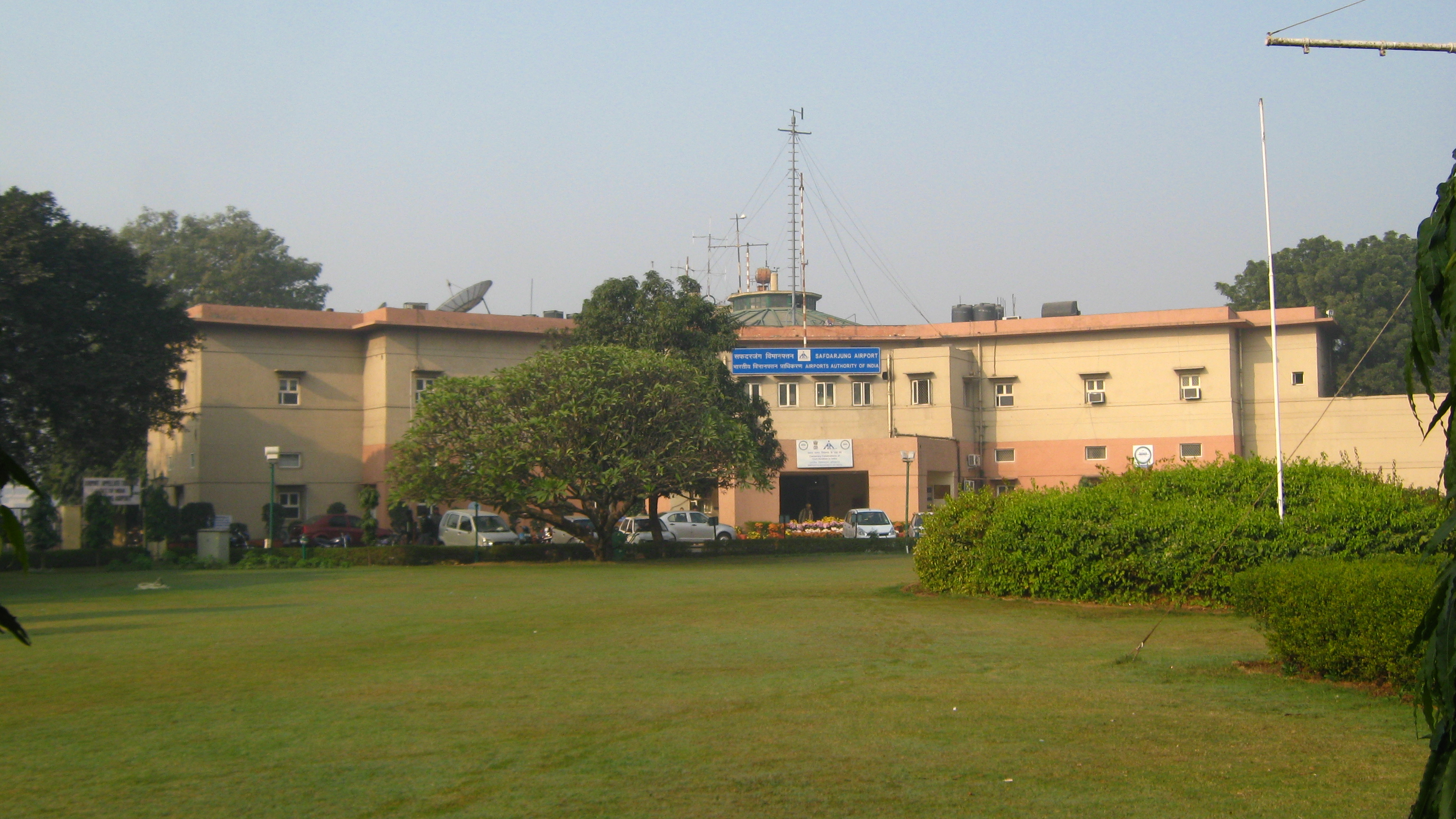 Safdarjung Airport Terminal Building